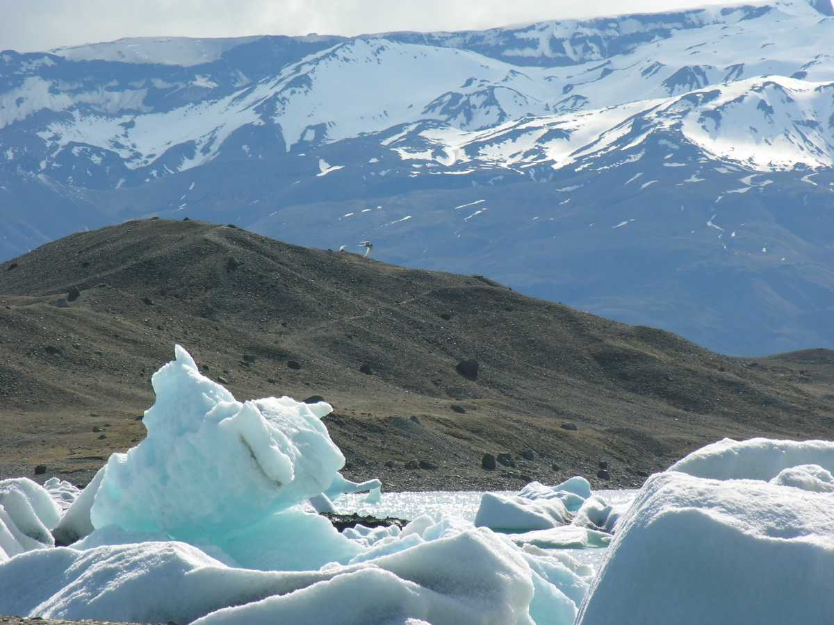 Jökulsárlón, Iceland